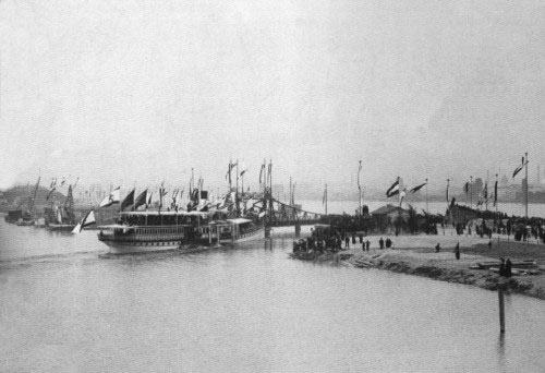 Fotografie von der Mainzer Zollhafen Einweihung am 6. Juni 1887 Mainz.